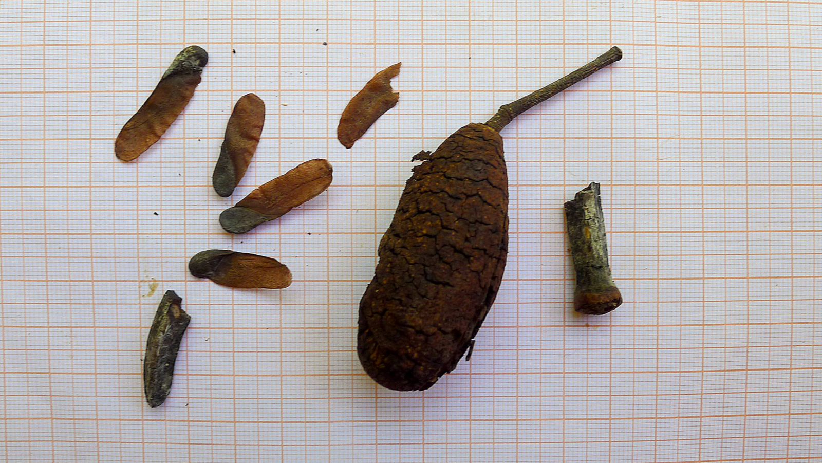 Cariniana legalis (Mart.) Kuntze